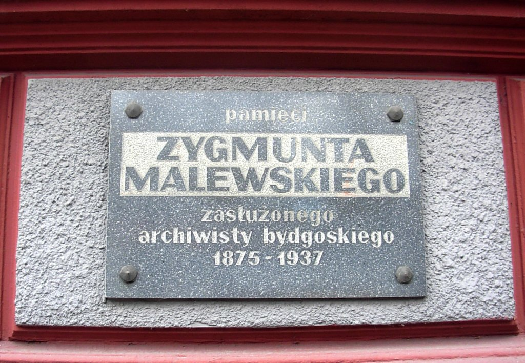 Archiwum Państwowe ul. Dworcowa 65 w Bydgoszczy, tablica pamiątkowa